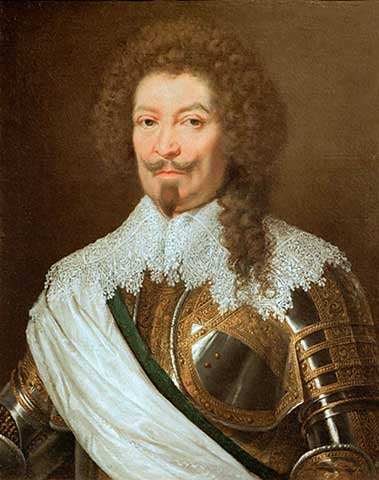 Portrait of Charles de Lorraine, duke of Guise